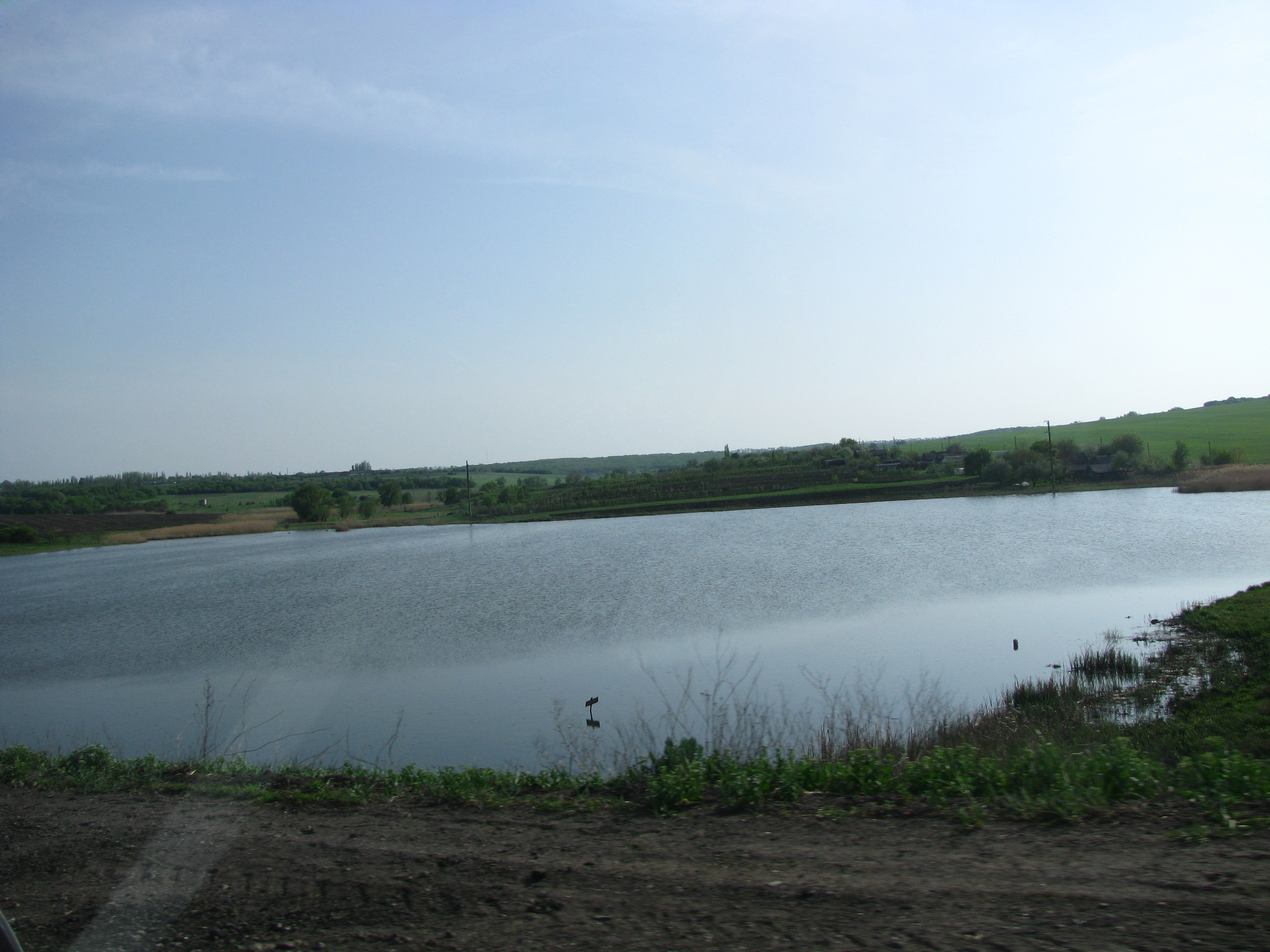 Пруд у с. Приволье